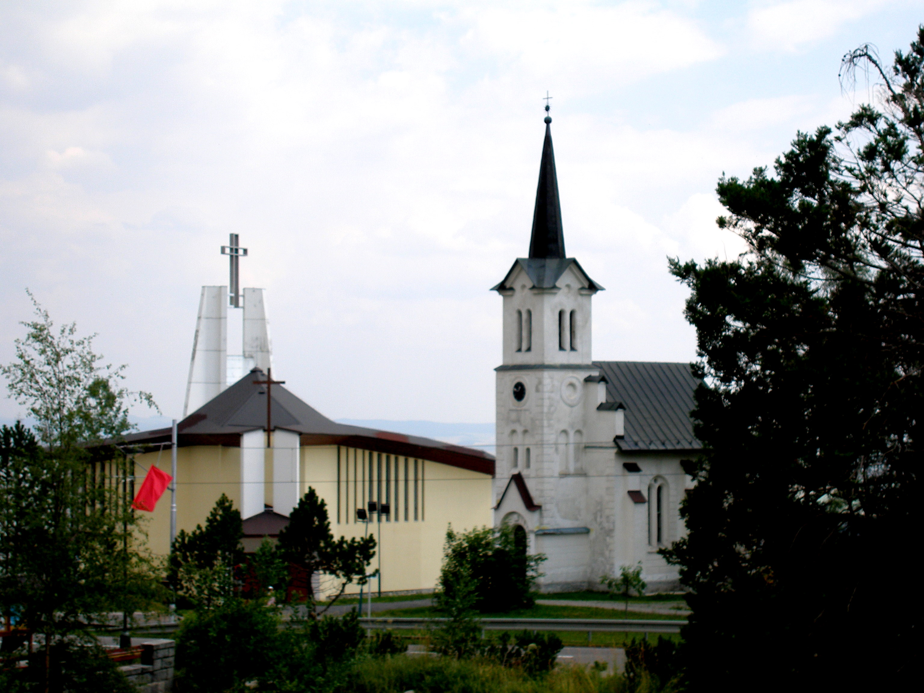 Kostol Nový Smokovec Tatry